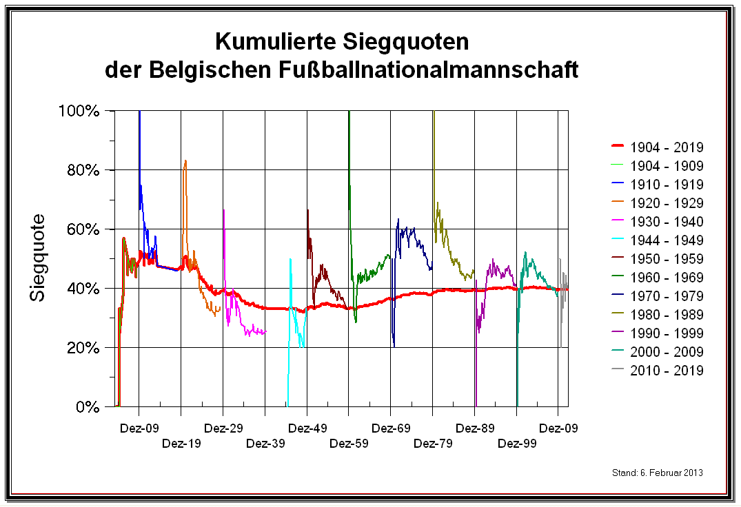 Kumulierte Siegquote der Belgischen Nationalmannschaft